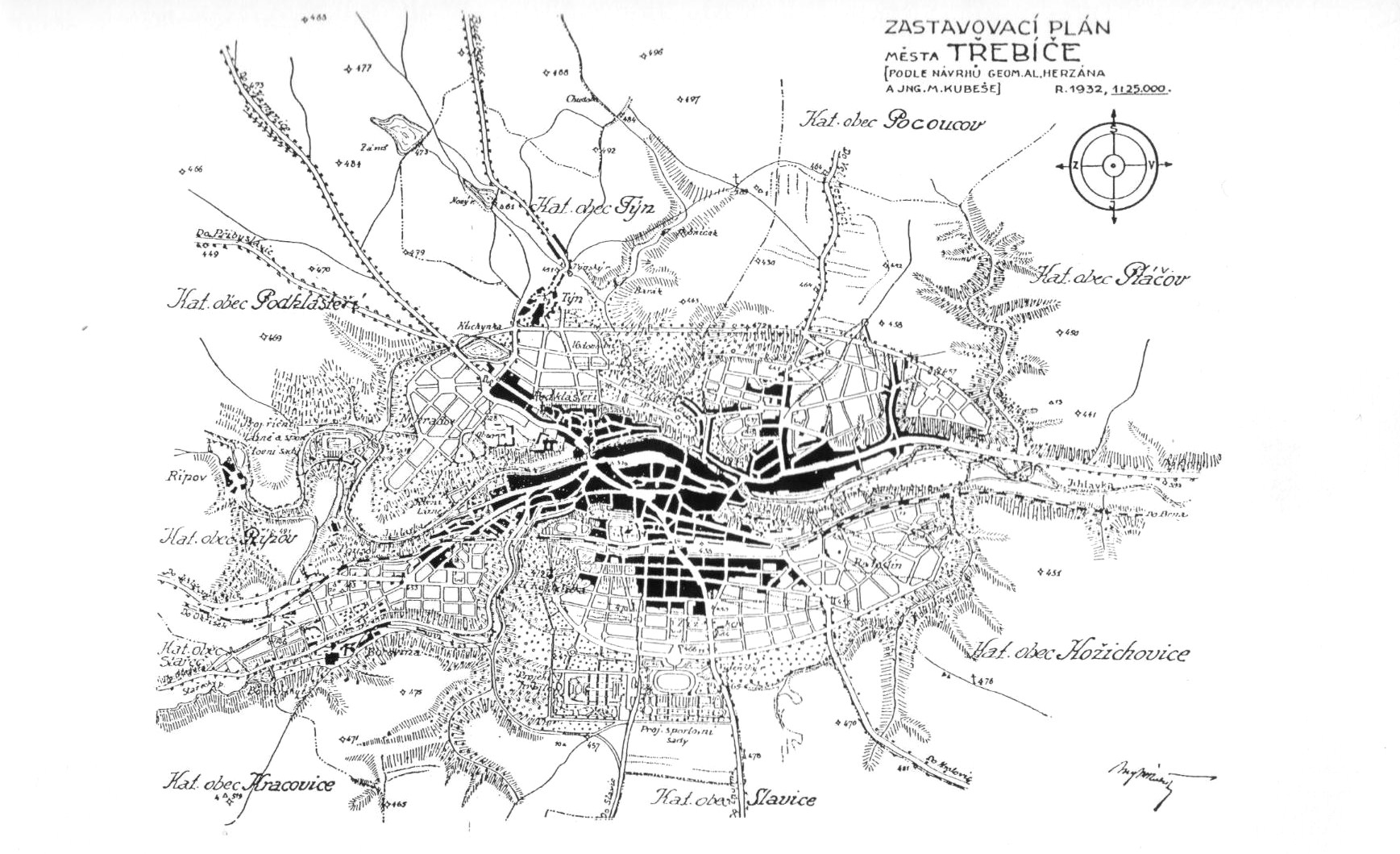 Zastavovací plán města Třebíče z roku 1932